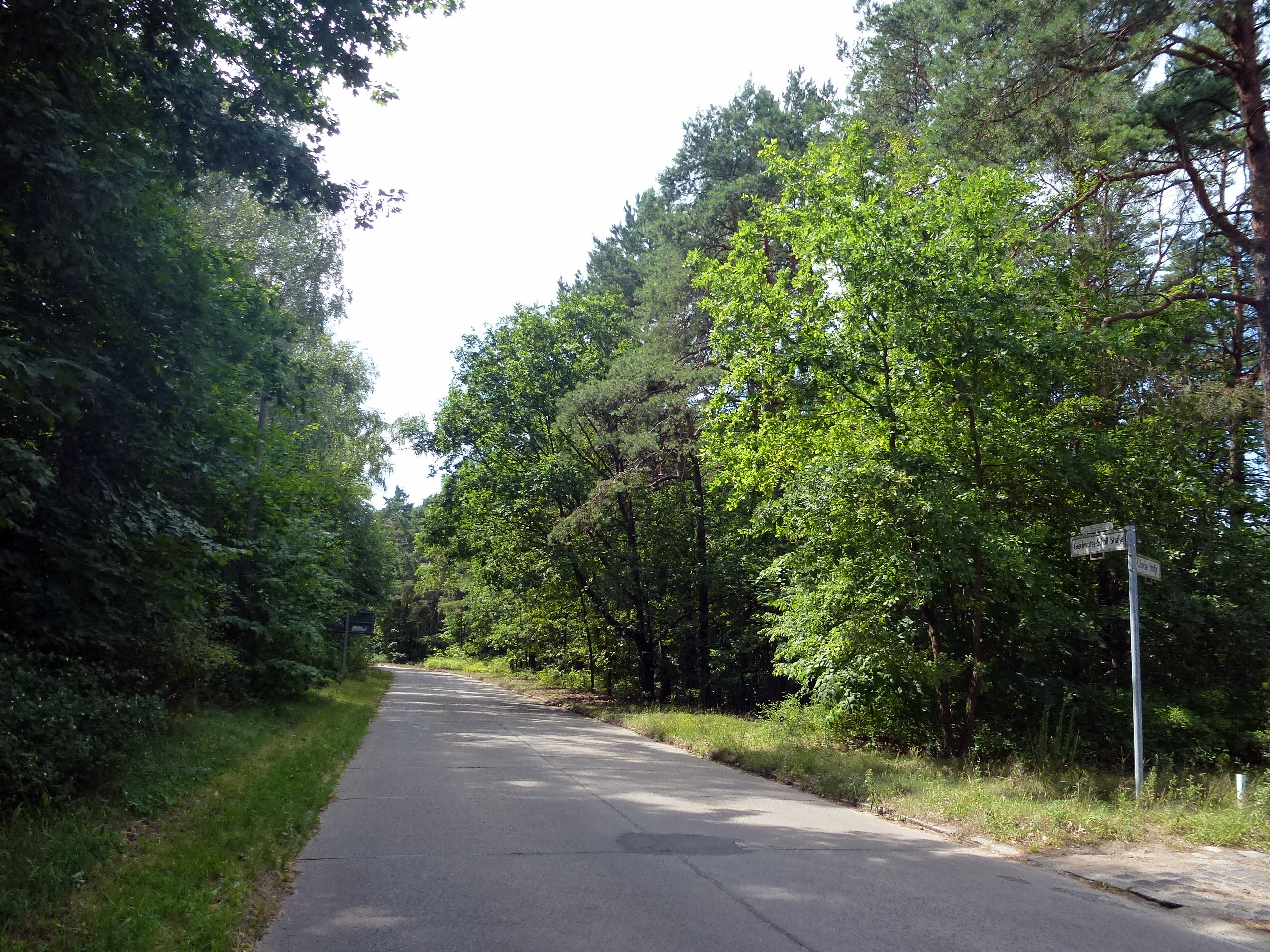 Berlin-Rahnsdorf Geschwister-Scholl-Straße